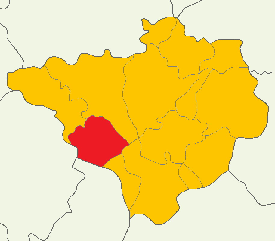 Yozgat'ta 2014 Türkiye cumhurbaşkanlığı seçimi sonuçları